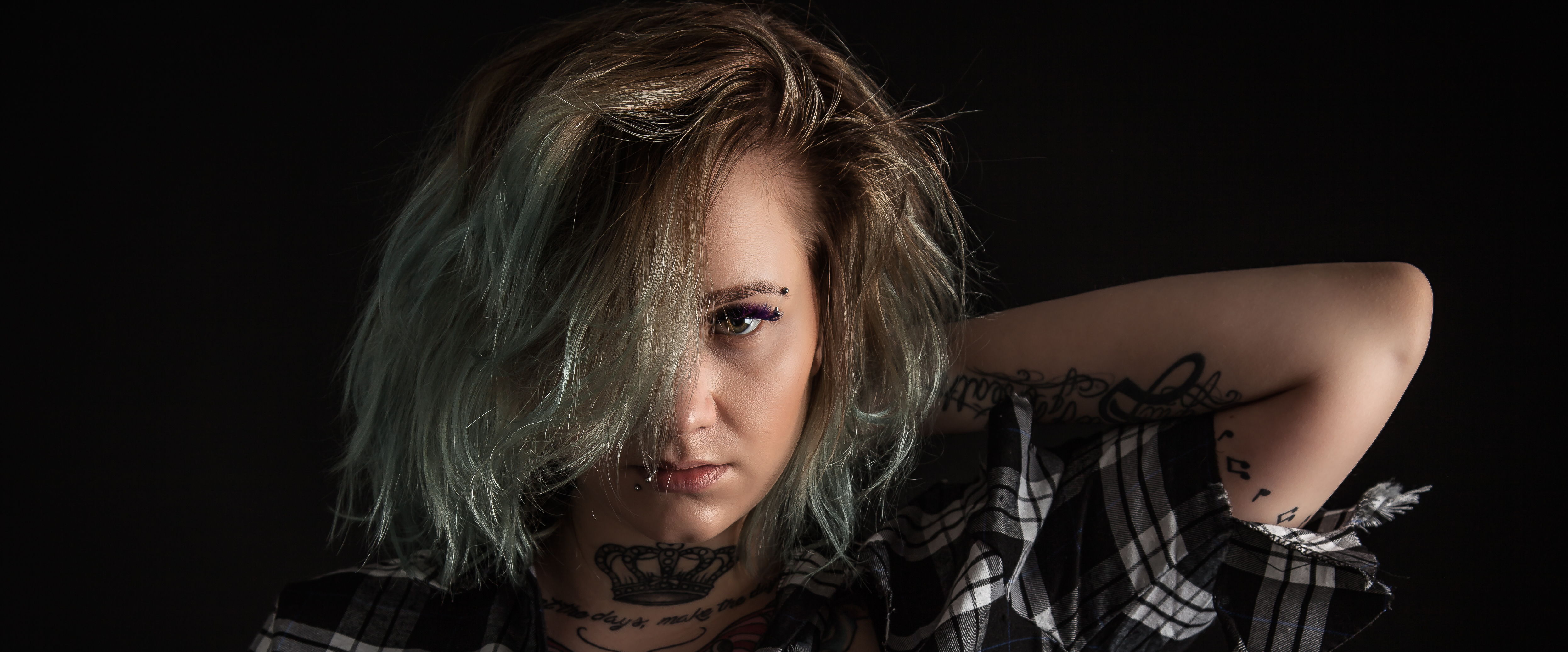 Kuva: Toni Manninen